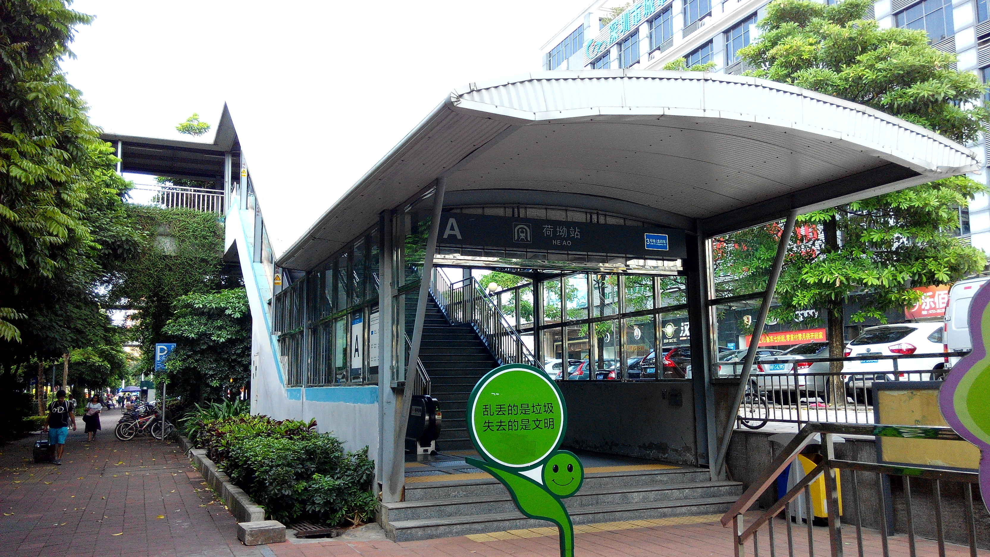 深圳地铁三号线 荷坳站A出口